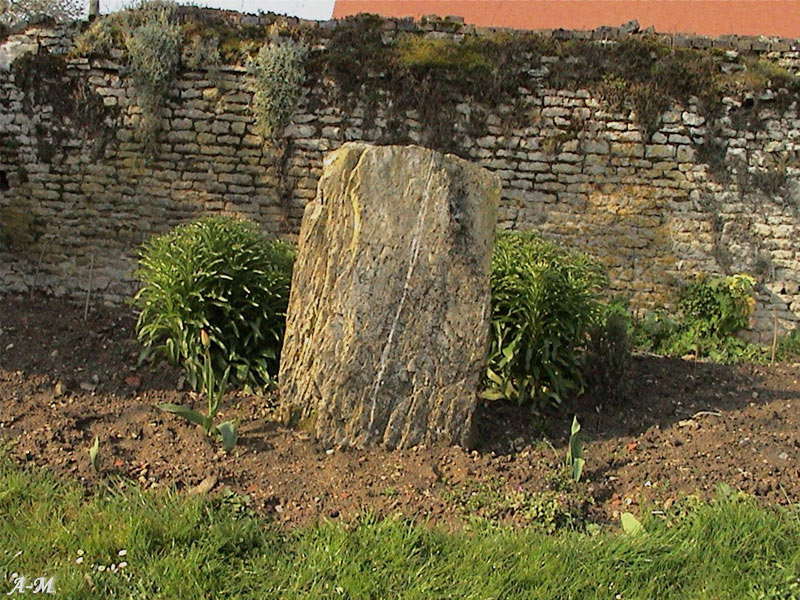 Menhir découvert sur la commune d'Epaney (Calvados) Photo réalisée par Anne-Marie Lemarchand, conceptrice du site page où on peut voir cette photo